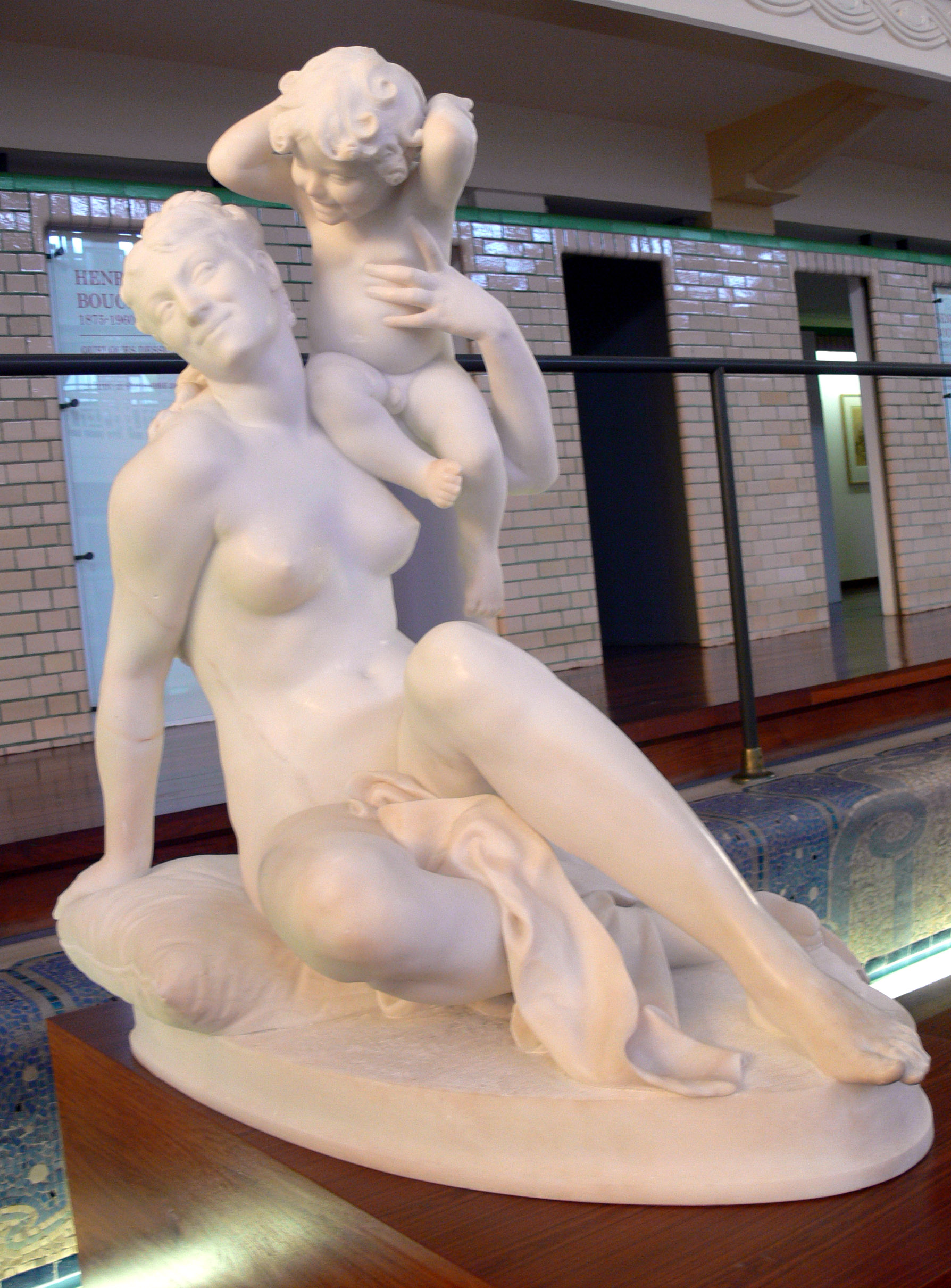 «Femme jouant avec son enfant» : sculpture de Jean-Baptiste Hugues (1849-1930), Rome, 1880, Marbre, Dépôt du fonds national d'art contemporain, en 1903 à destination de La Piscine, Musée d'Art et d'Industrie (Roubaix)